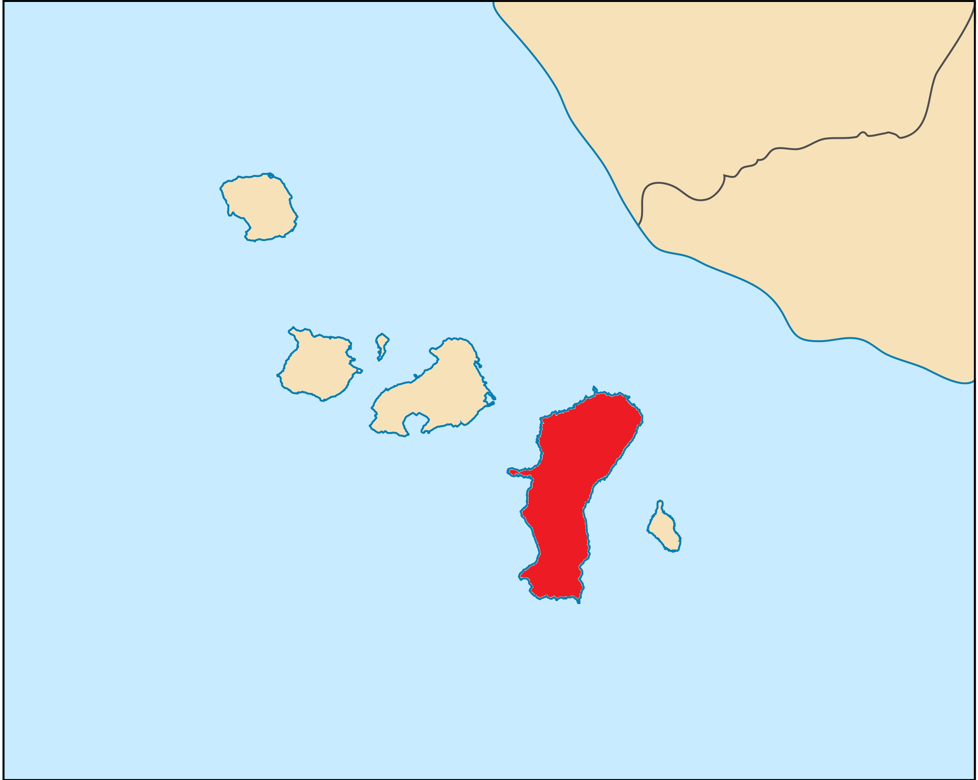 Büyükada'nın konumu